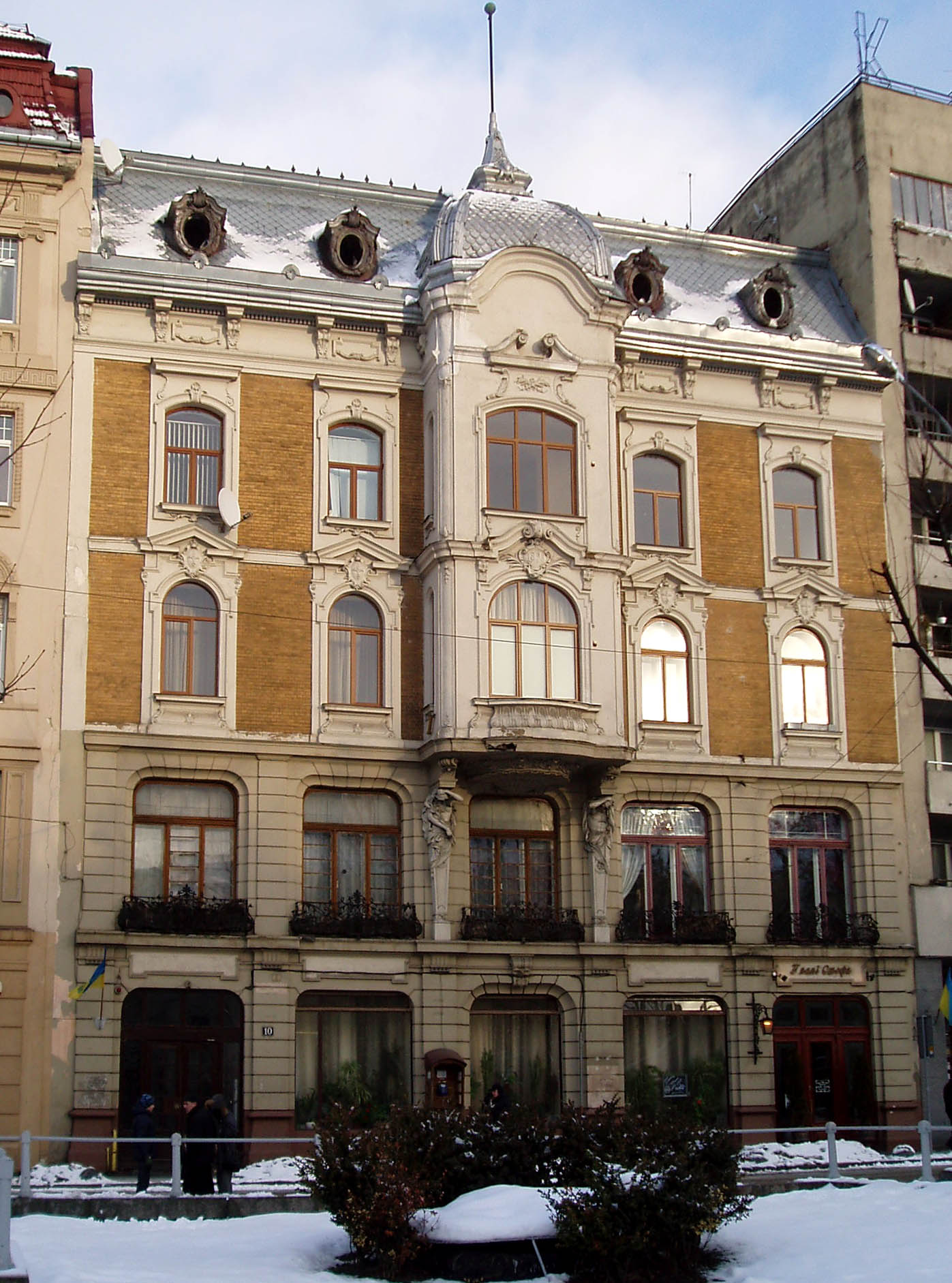 Колишній будинок Авансового банку на проспекті Свободи, 10 у Львові. Збудований 1898 року за проектом Іполіта Слівінського у стилі історизму.